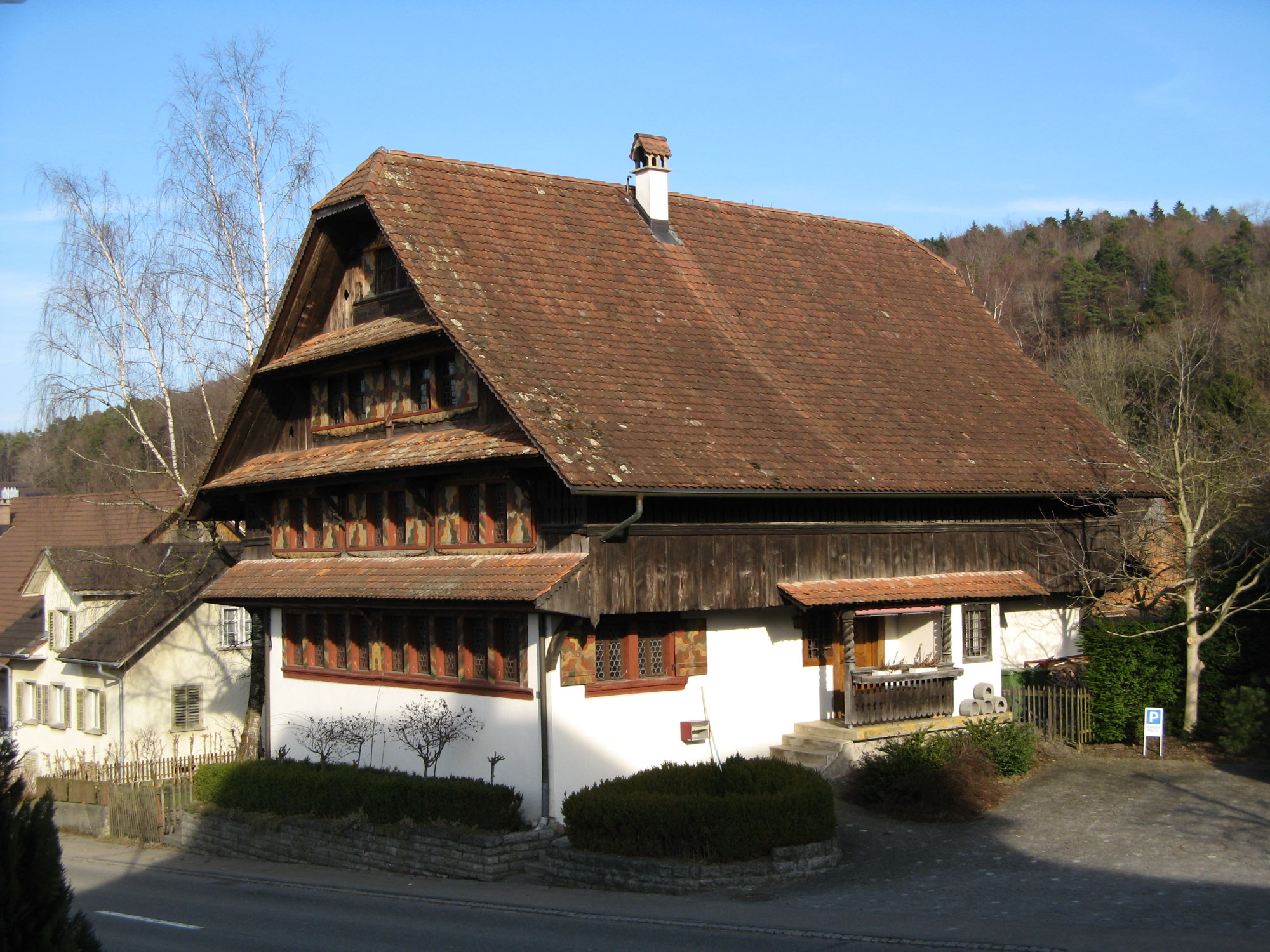 Das Koch-Haus in Büttikon, erbaut 1791